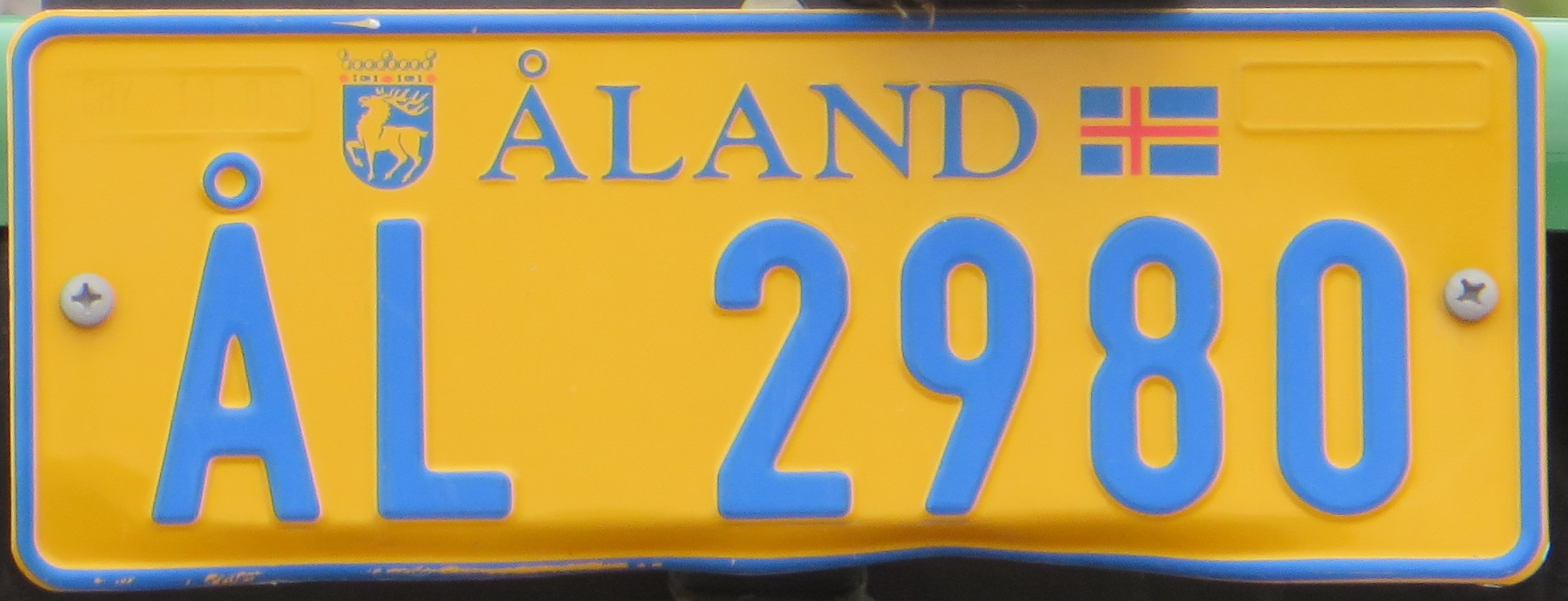 Åland niewe tractor plaat